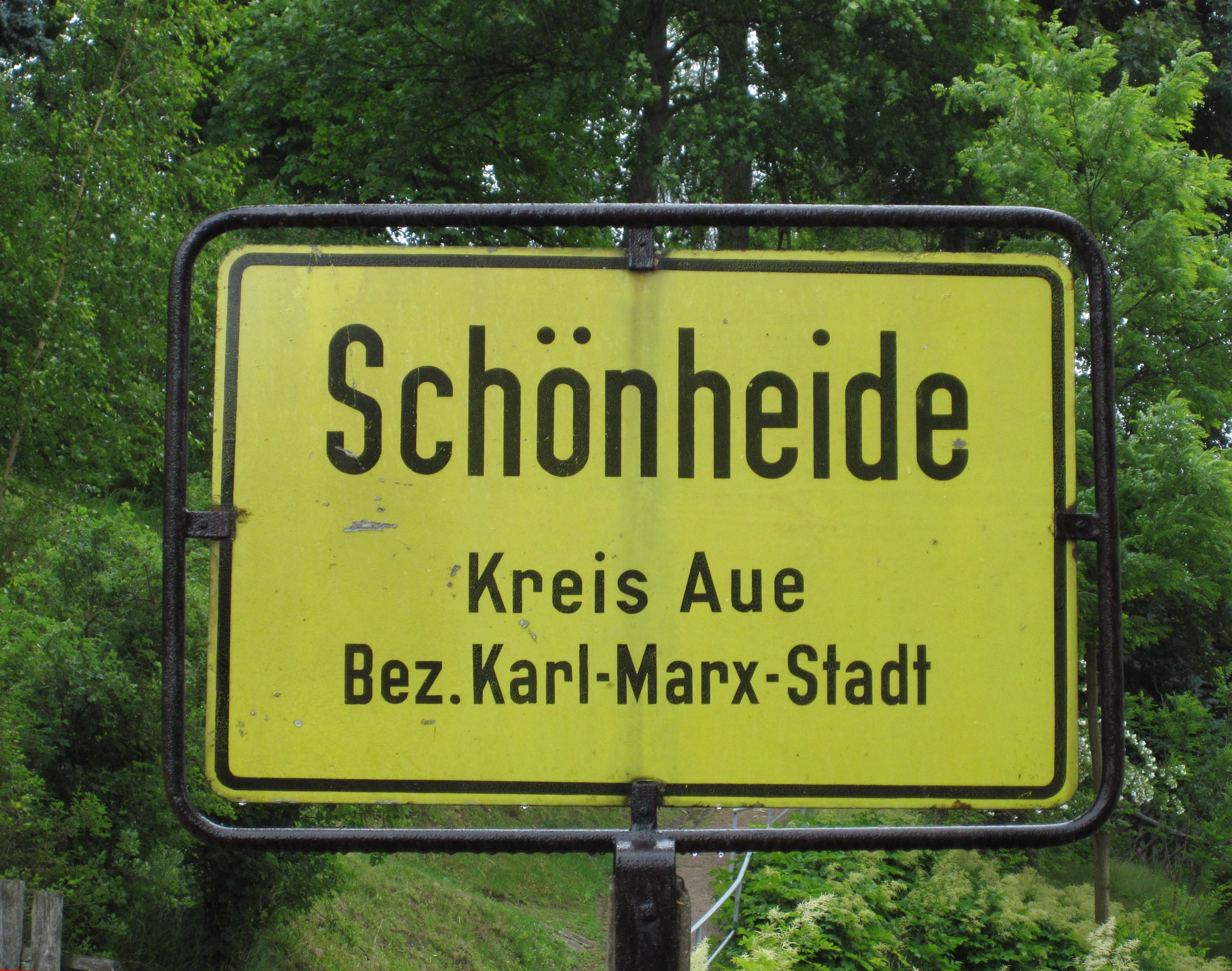 Schönheide: Hinter dem Bürsten- und Heimatmuseum aufgestelltes Ortseingangsschild aus der DDR-Zeit. Schönheide war das letzte Dorf des Kreises Aue vor dem Vogtland, „das letzte“ meint, dass es das am weitesten westlich gelegene Dorf war. Die Orientierung an den Verhältnissen im Kreis Auerbach/Vogtland war nicht selten – und ging fast immer zu Lasten des Kreises Aue aus. Die „Versorgung“ (mit Waren des täglichen Bedarfs von Obst, Gemüse, Lebensmitteln allgemein) sei besser gewesen, der Kreis Aue habe die DDR-Vorschriften immer buchstabengetreu umgesetzt. „Des sei ja tausendprozendiche.“ Oft empfanden sich Schönheider als letzte im Wortsinn.